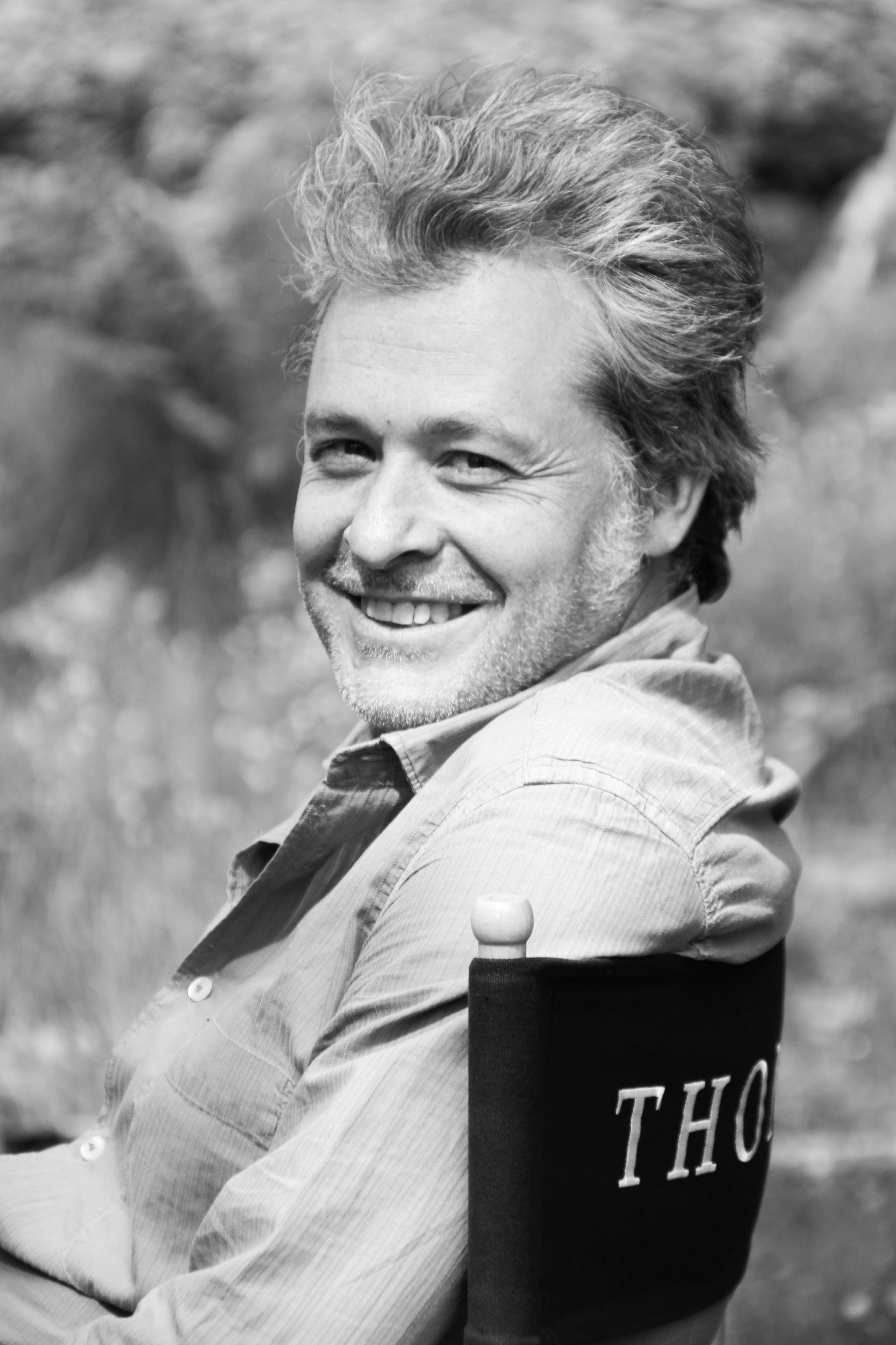 Photo de Thomas Szabo 2012